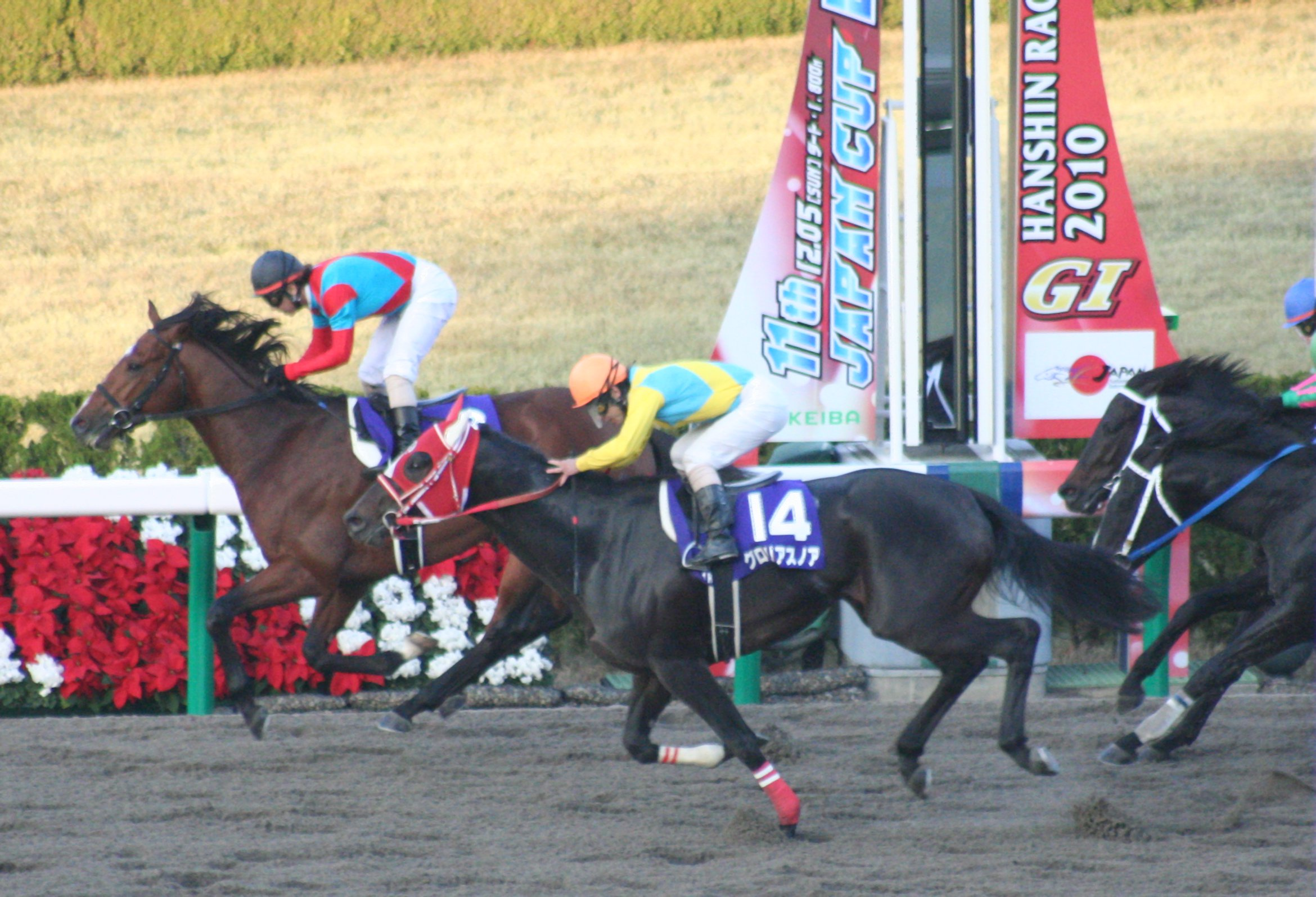 第11回ジャパンカップダート（阪神競馬場）